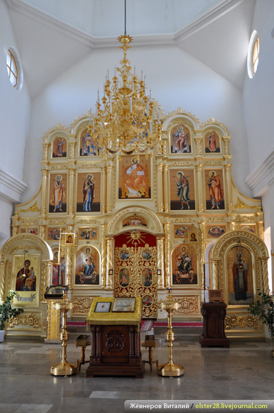 Восстановленный храм в честь святителя Николая Чудотворца, Свято-Никольский монастырь, посёлок Монастырский, Саратовская область